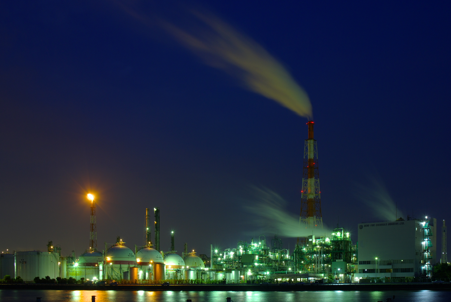 上野製薬四日市工場の夜景。デジタルシフト使用。